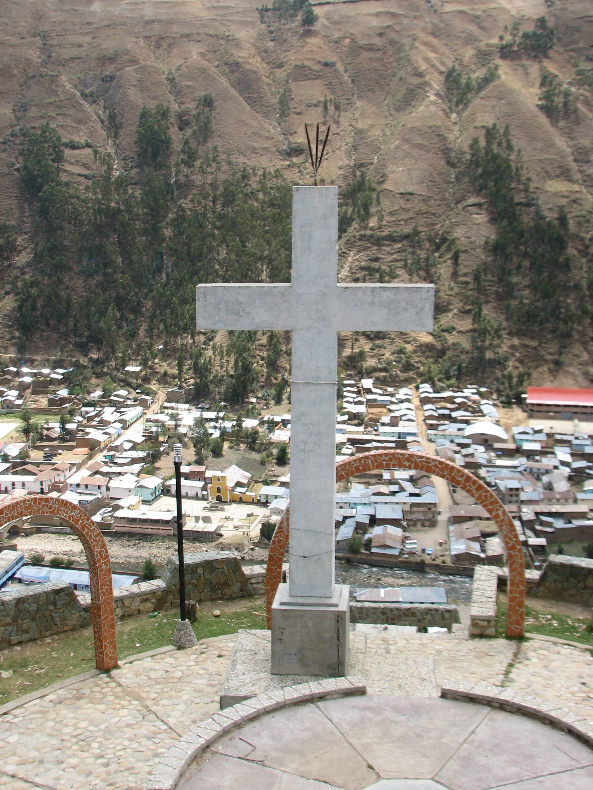 Cross in La Unión in Chinchaysuyo/Dos de Mayo/Huánuco, Peru.